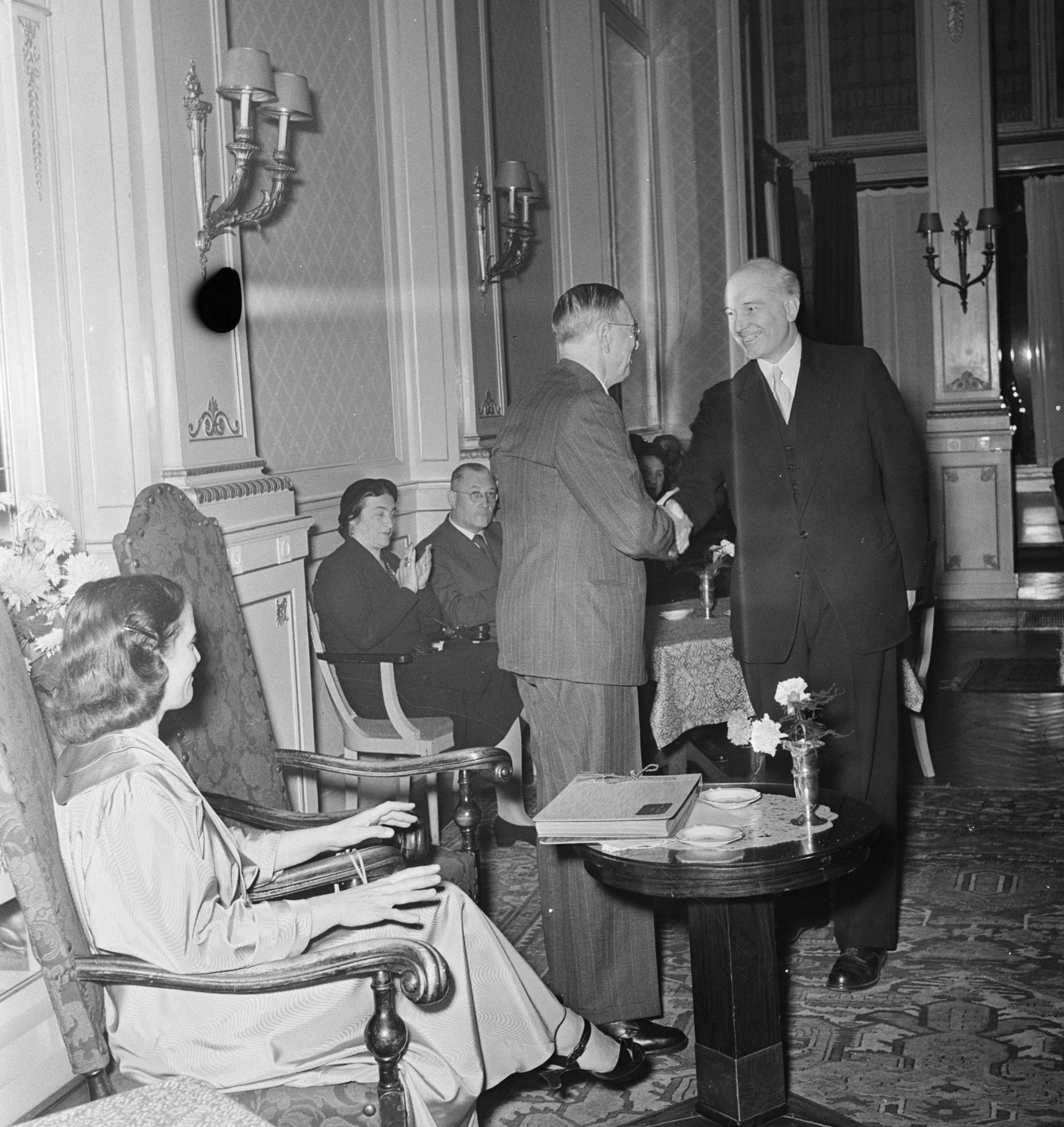 Victor E. van Vriesland 60 jaar. Professor Donkersloot feliciteert